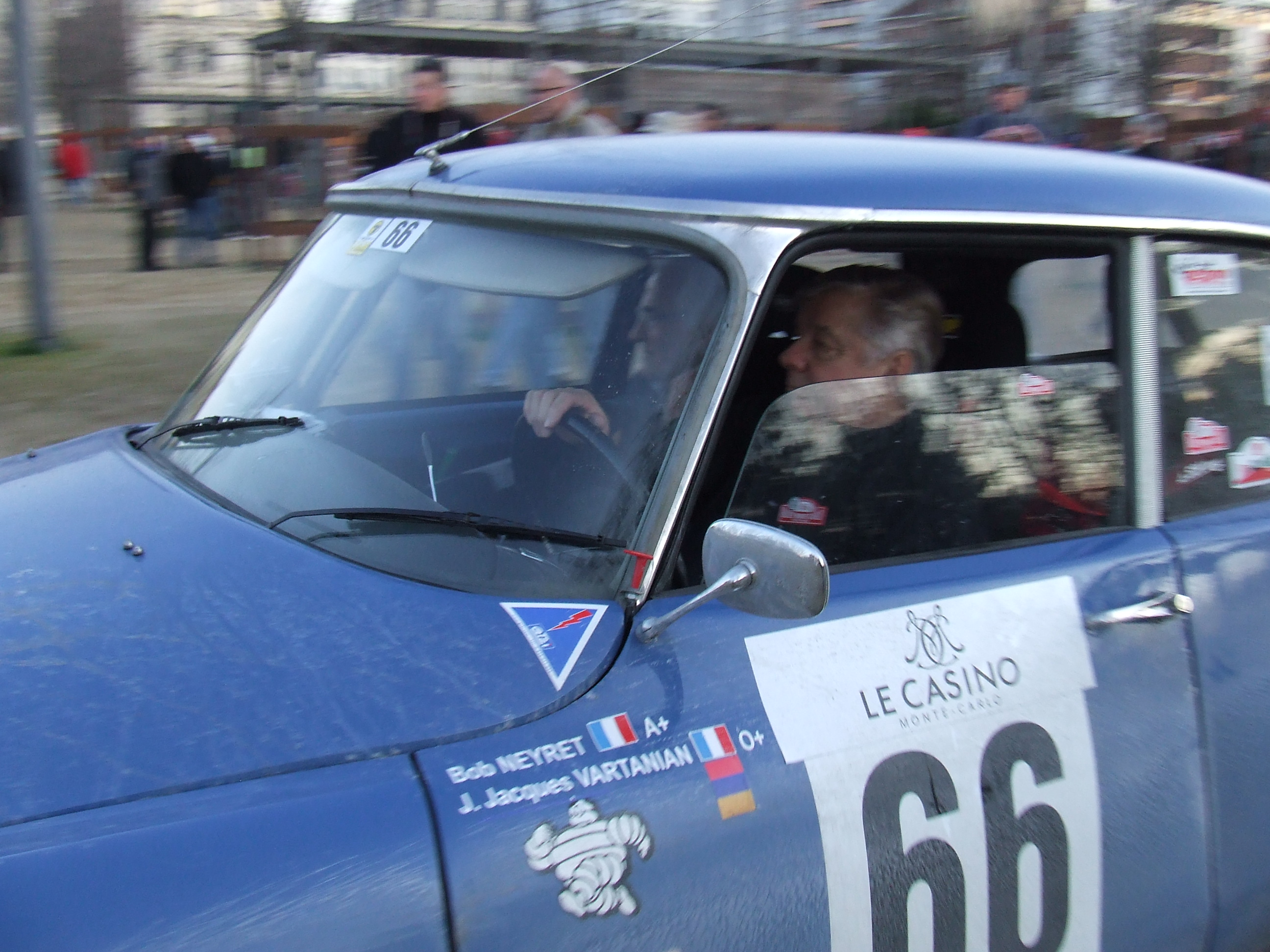 Bob Neyret au départ du Rallye Monte-Carlo historique 2010